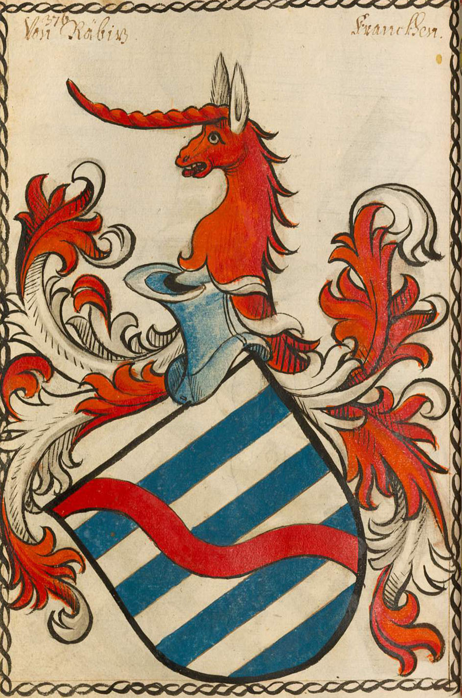 Scheibler'sches Wappenbuch, älterer Teil. Seite 376. Wappen von Redwitz. Von Räbiz Franckhen